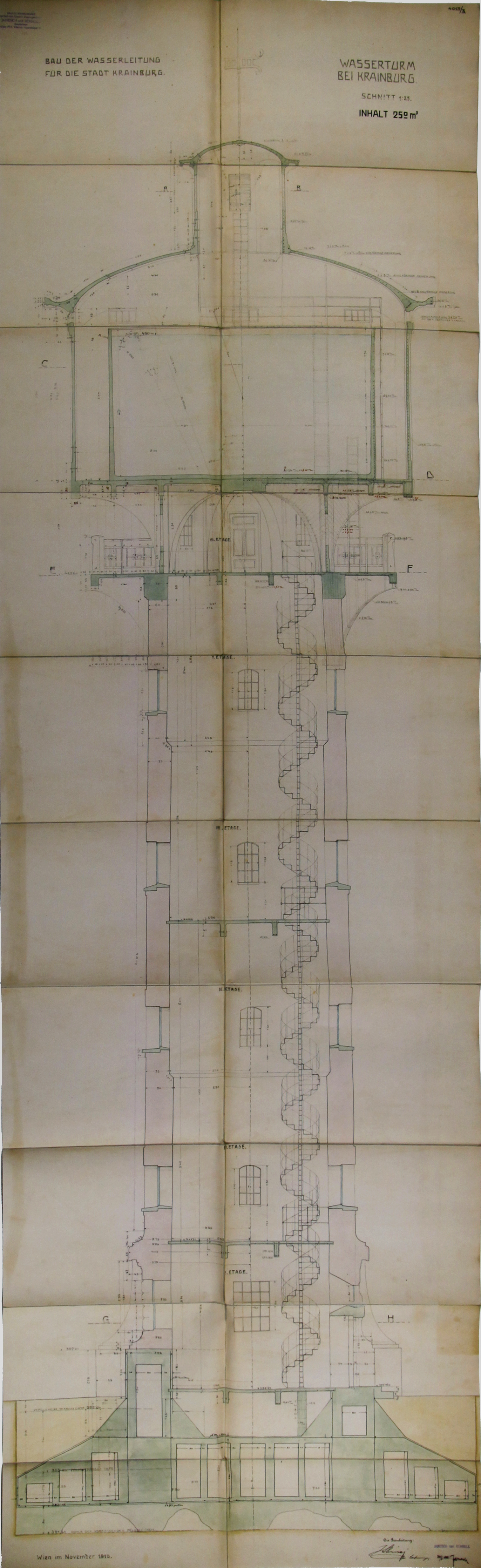 Načrt vodovodnega stolpa v Kranju iz leta 1910. SI_ZAL_KRA/0002 Občina Kranj, t. e. 271, a. e. 4252.